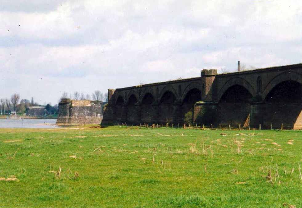 Die ehemalige Eisenbahnbrücke in Wesel; Naturschutzgebiet „Rheinaue zwischen Büderich und Perrich“